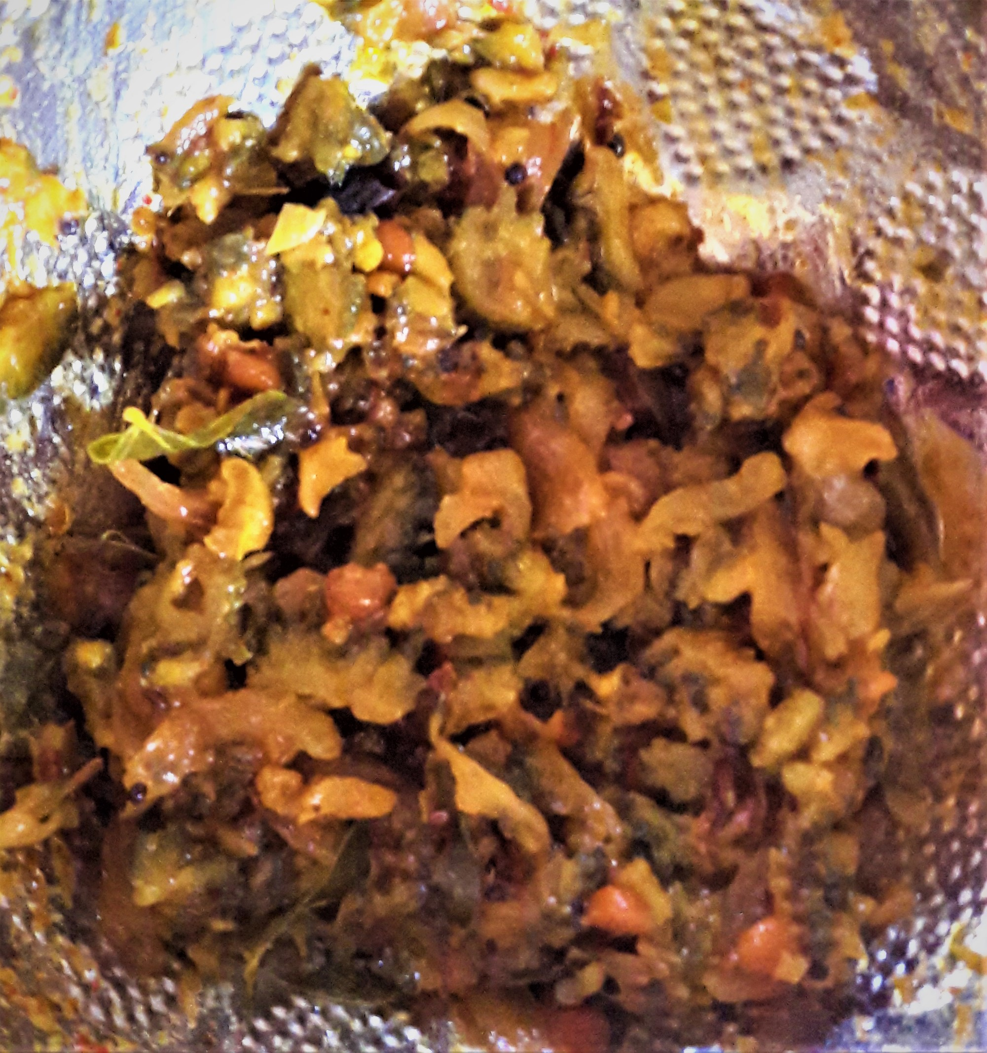 కాకరకాయ పులుసు కూర